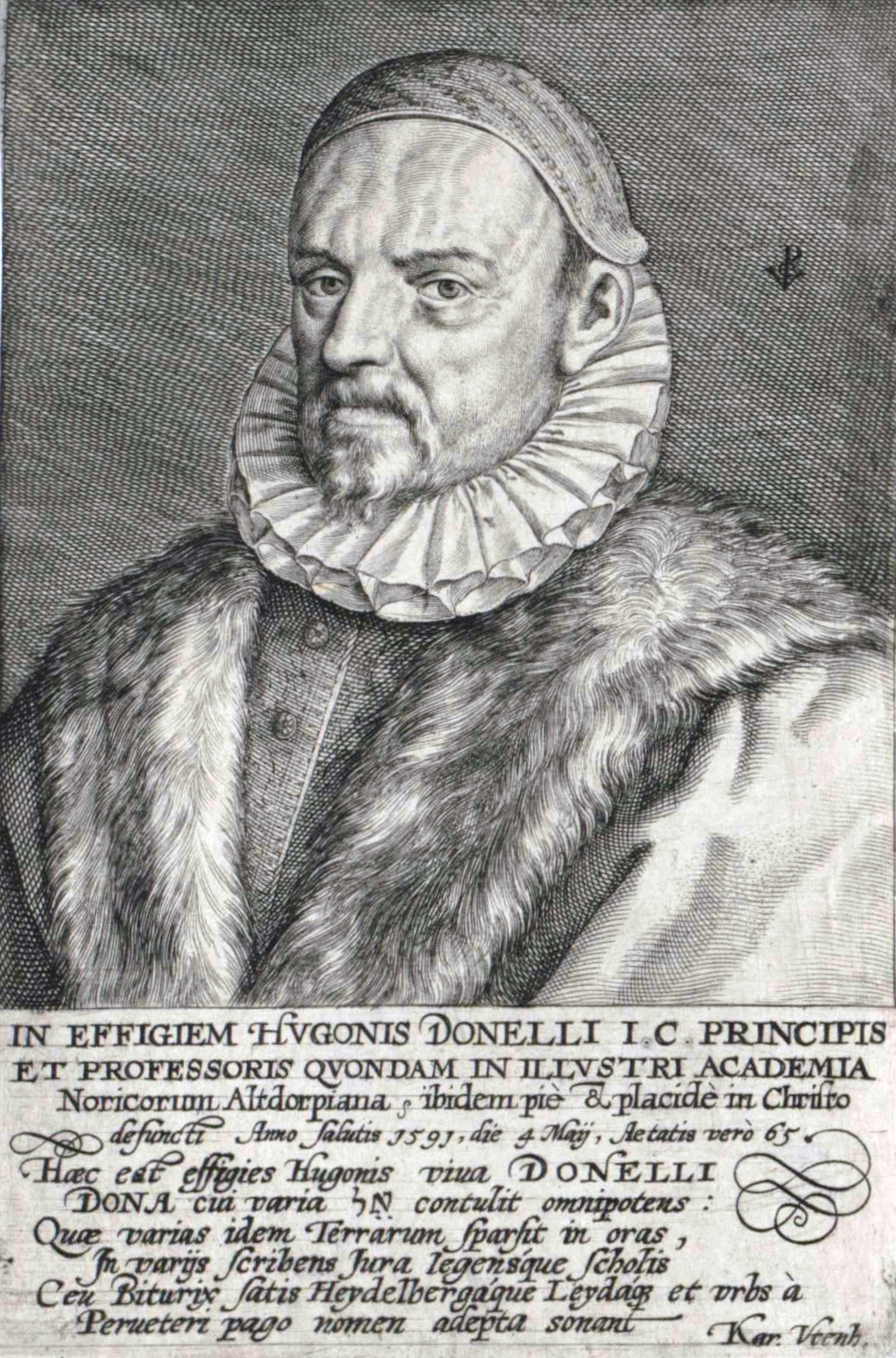 Hugo Donellus (1527–1591)